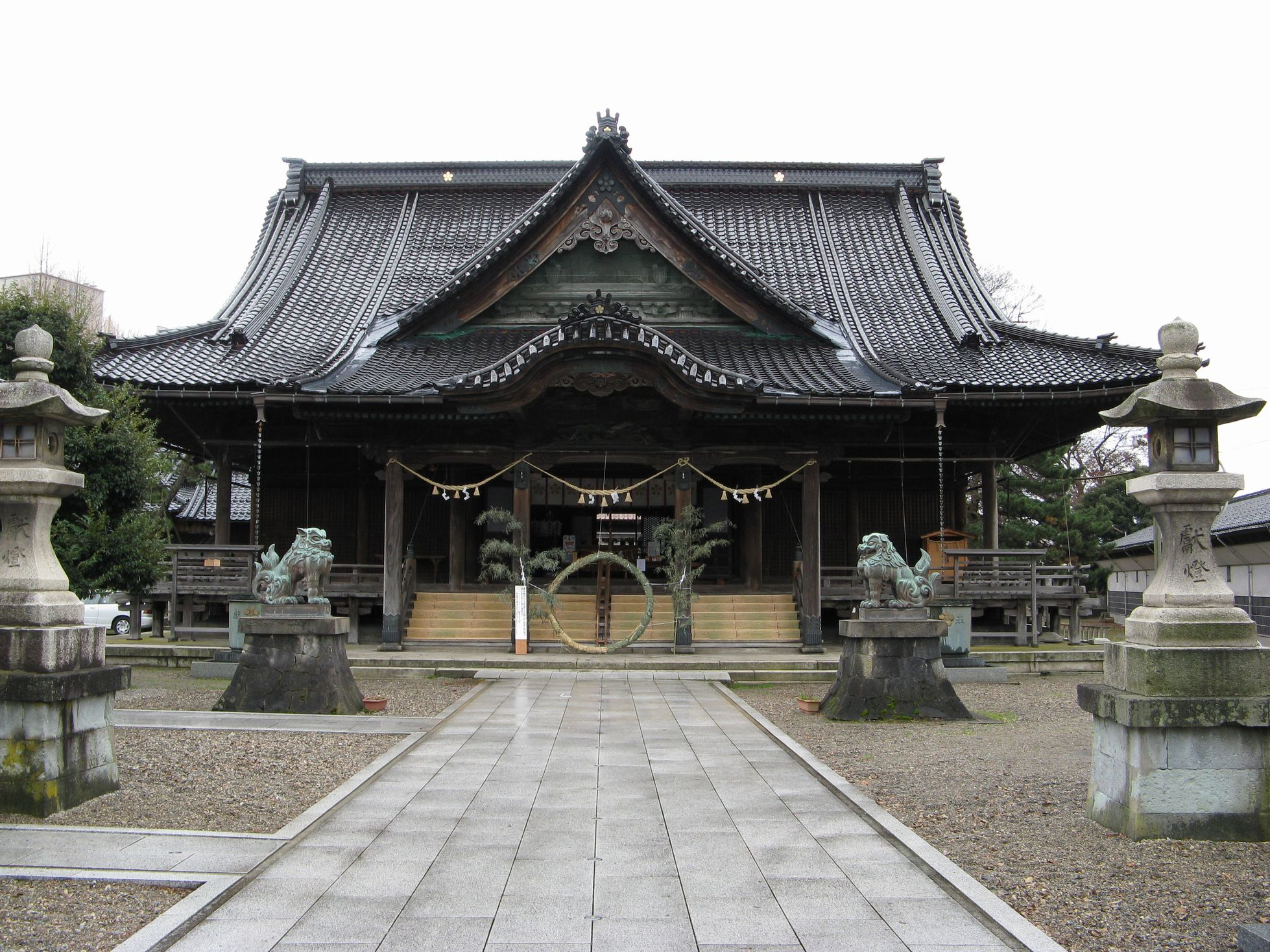 高岡関野神社拝殿（富山県高岡市）。